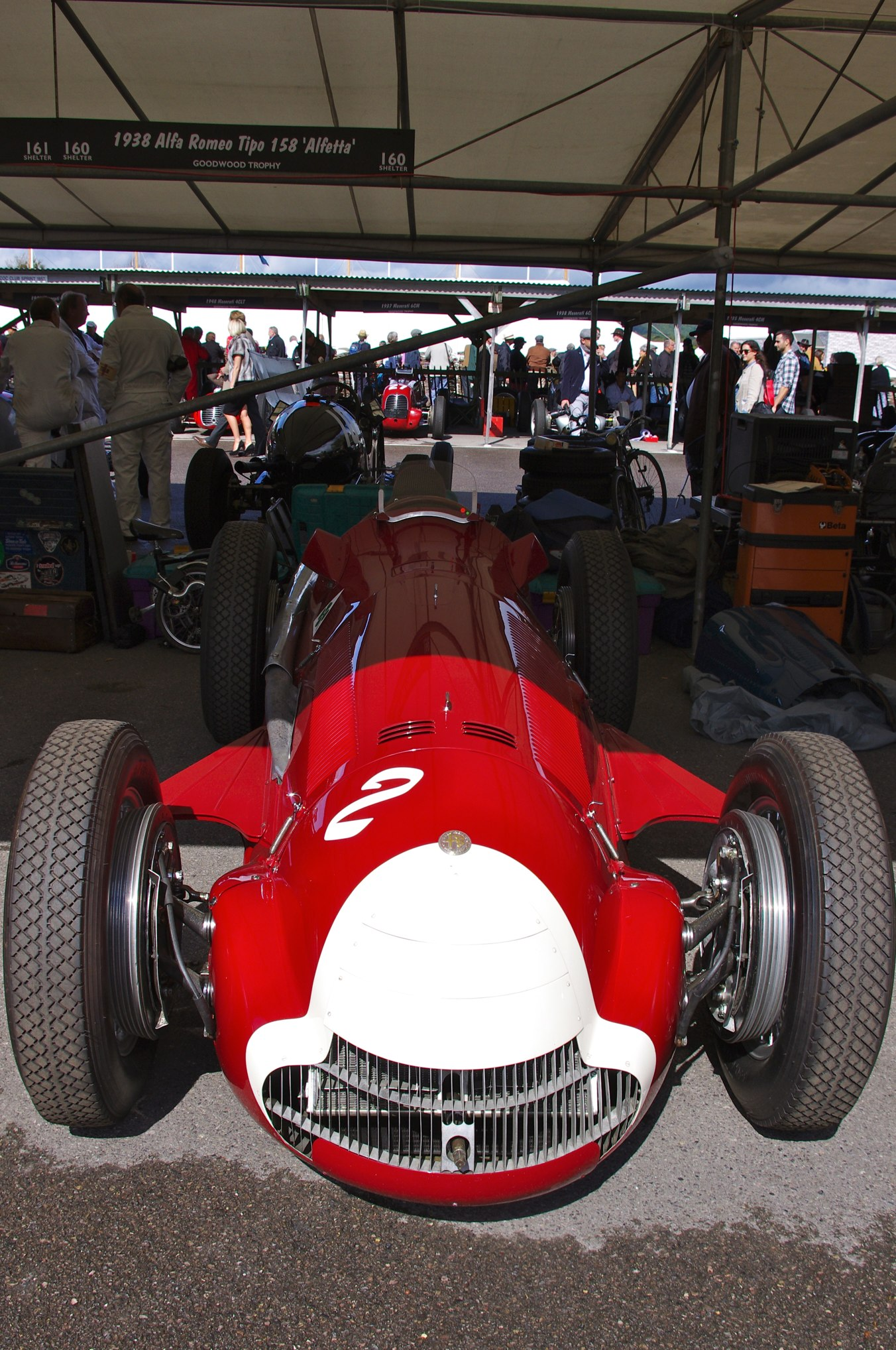 Goodwood Revival 2012